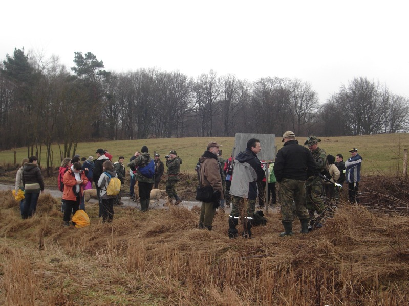 Zdjęcia z Rajdu "Witamy wiosnę". Fotorelacja artykułu